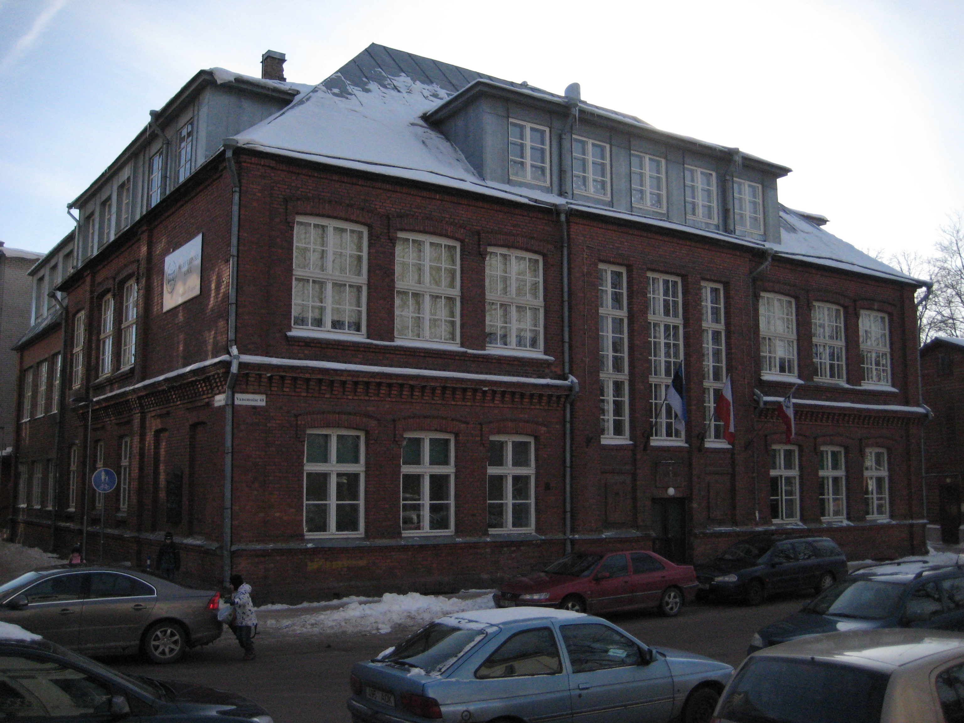 Vanemuise 48, Tartu, Mart Reiniku kooli õppehoone